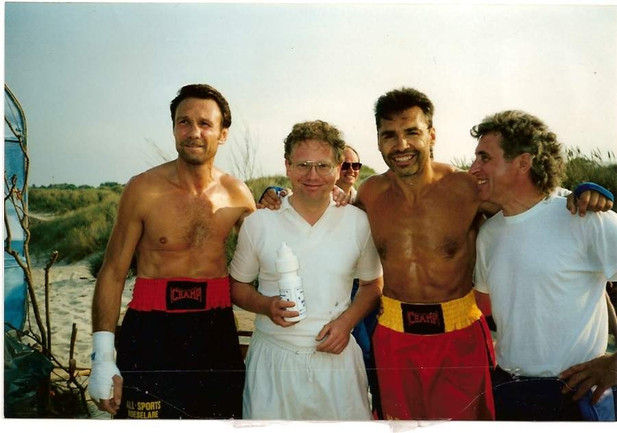 Foto van Jean-Pierre Coopman met Freddy De Kerpel op Camping Cosmos